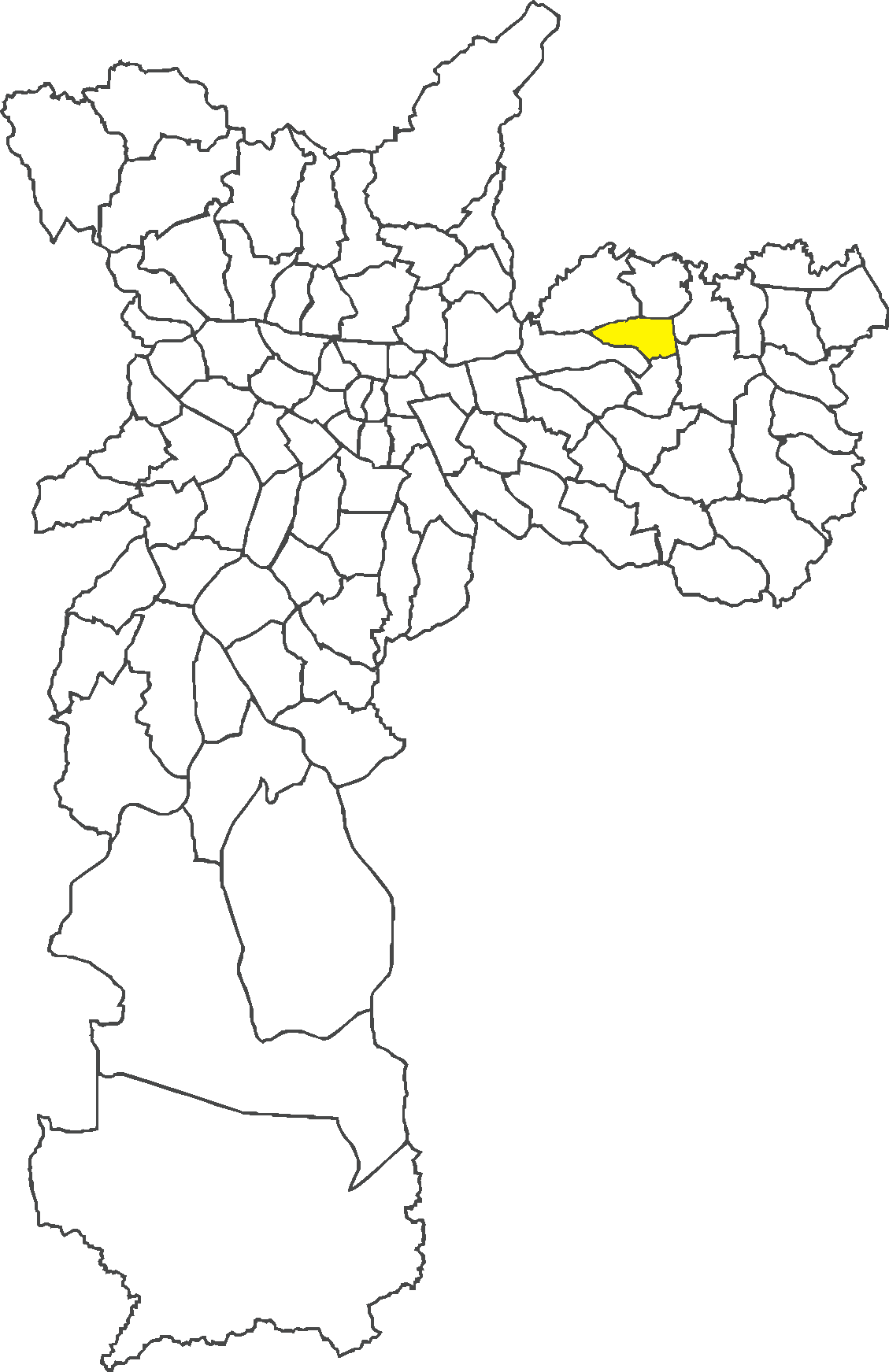 Localização do distrito de Ponte Rasa no município de São Paulo.